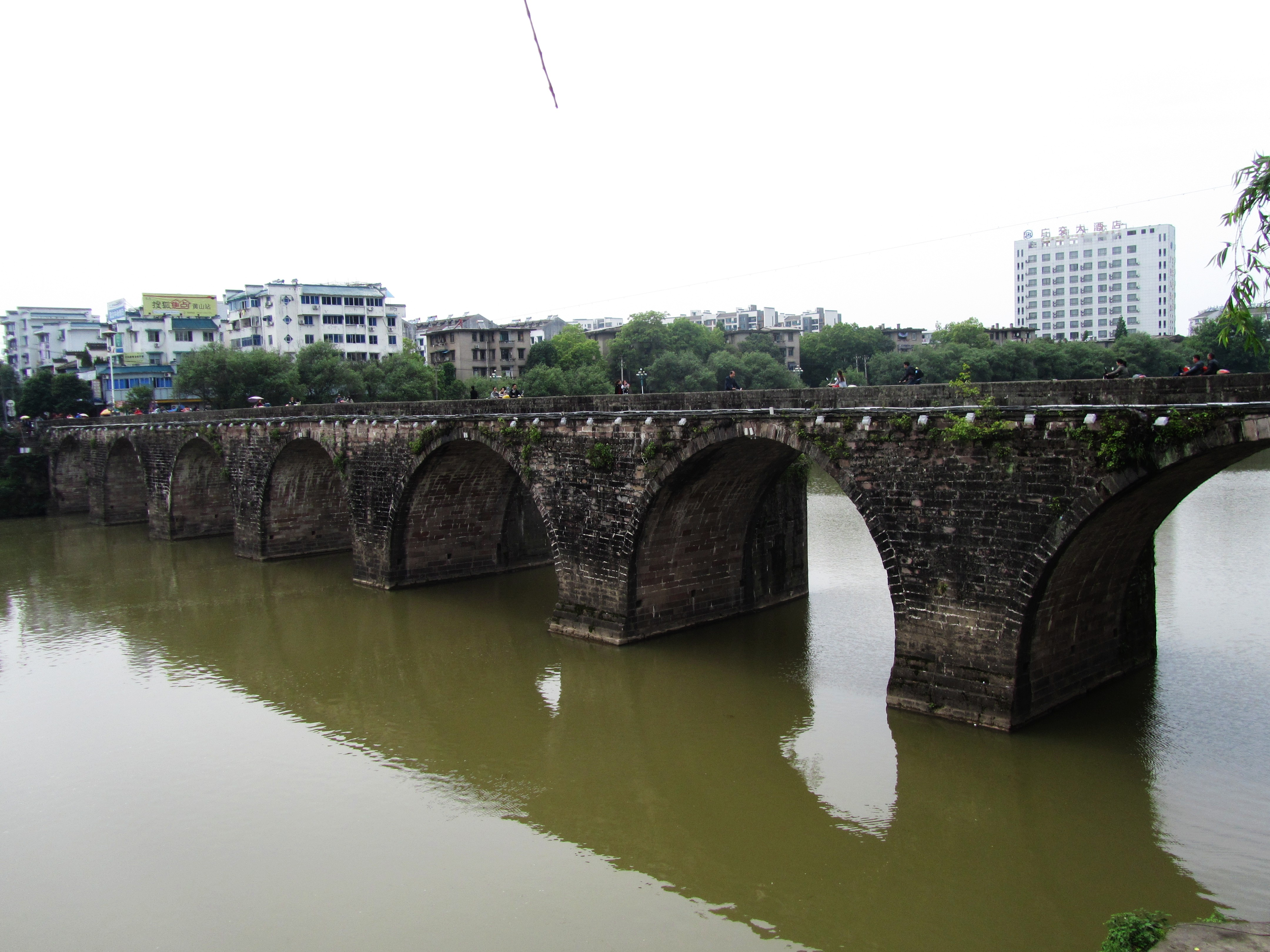 屯溪镇海桥，东面。